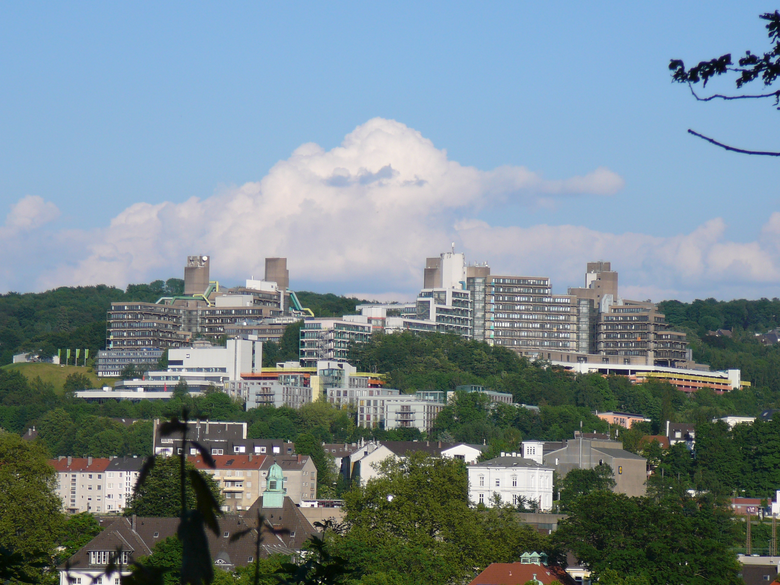 Uni Wuppertal